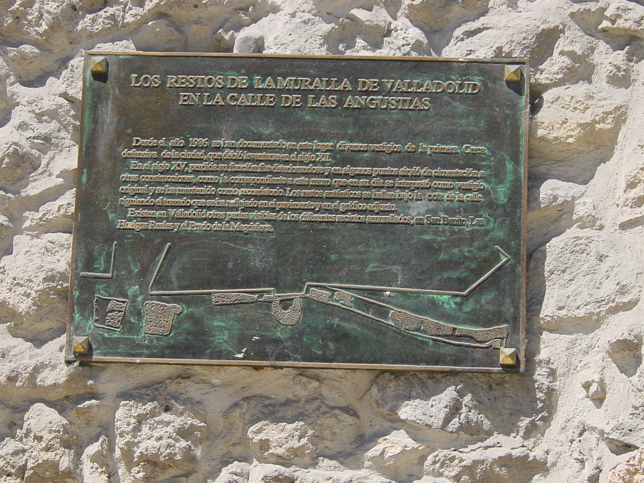 Restos de la cerca o muralla del siglo XII en la ciudad de Valladolid (España).